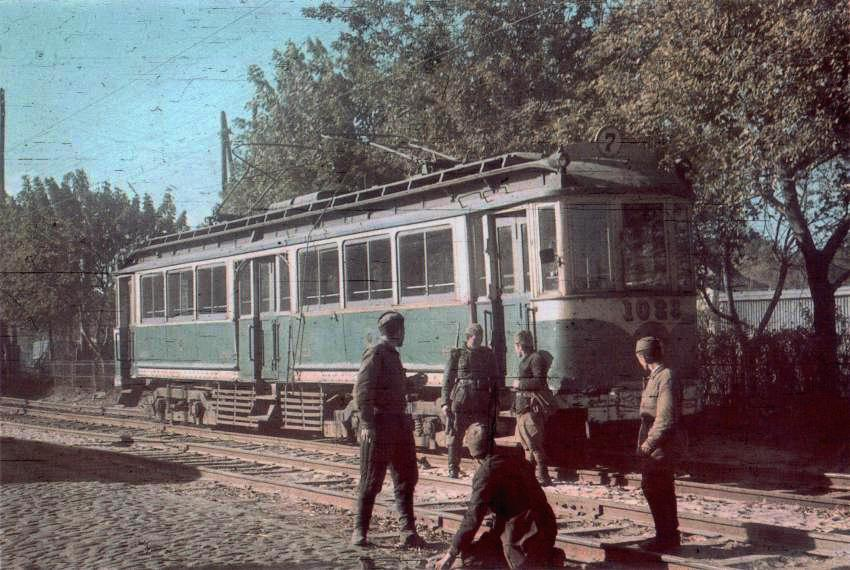 Київський трамвай німецька окупація.jpg